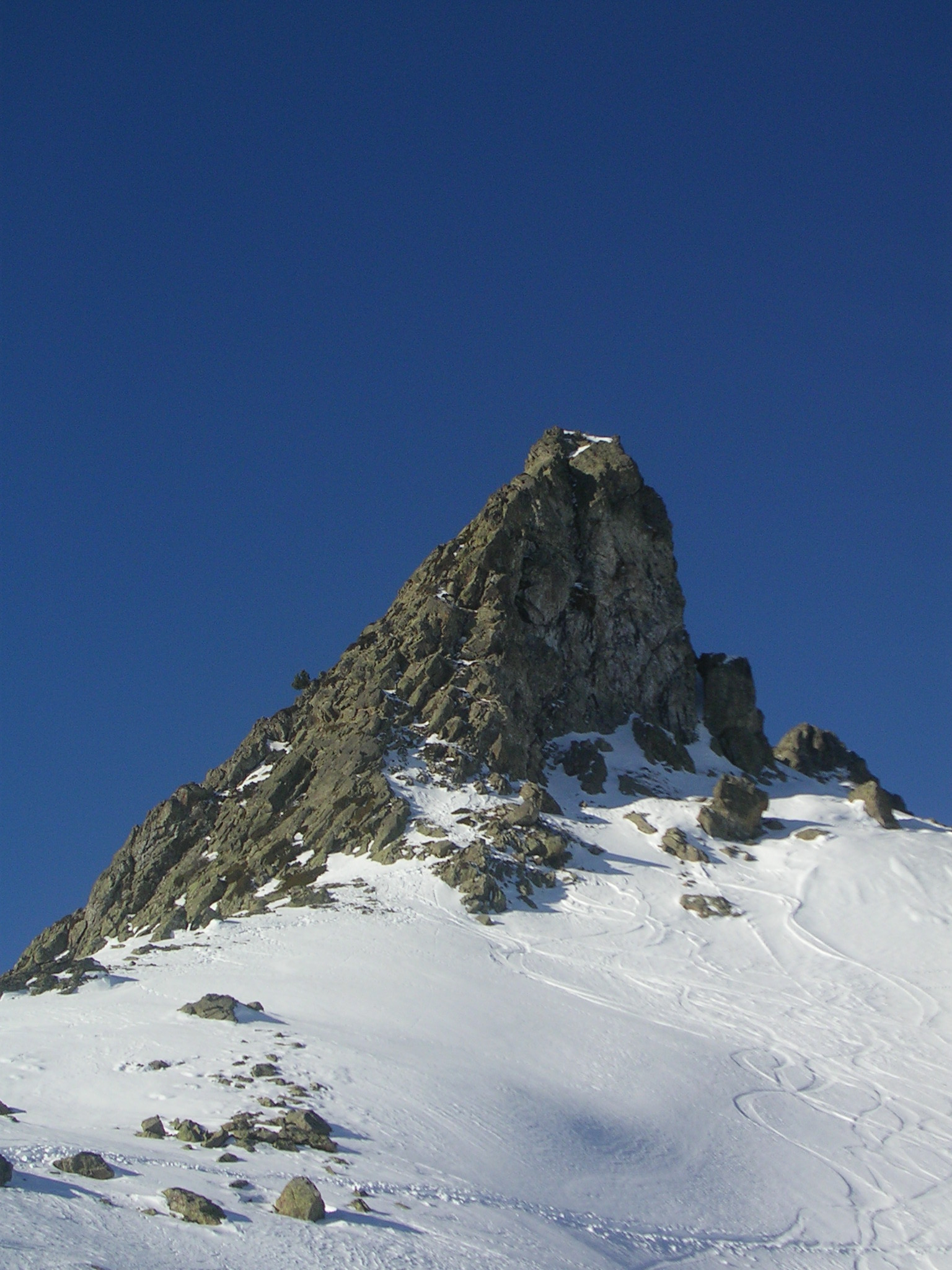 Pico situado en la estación de esquí Aramón Formigal